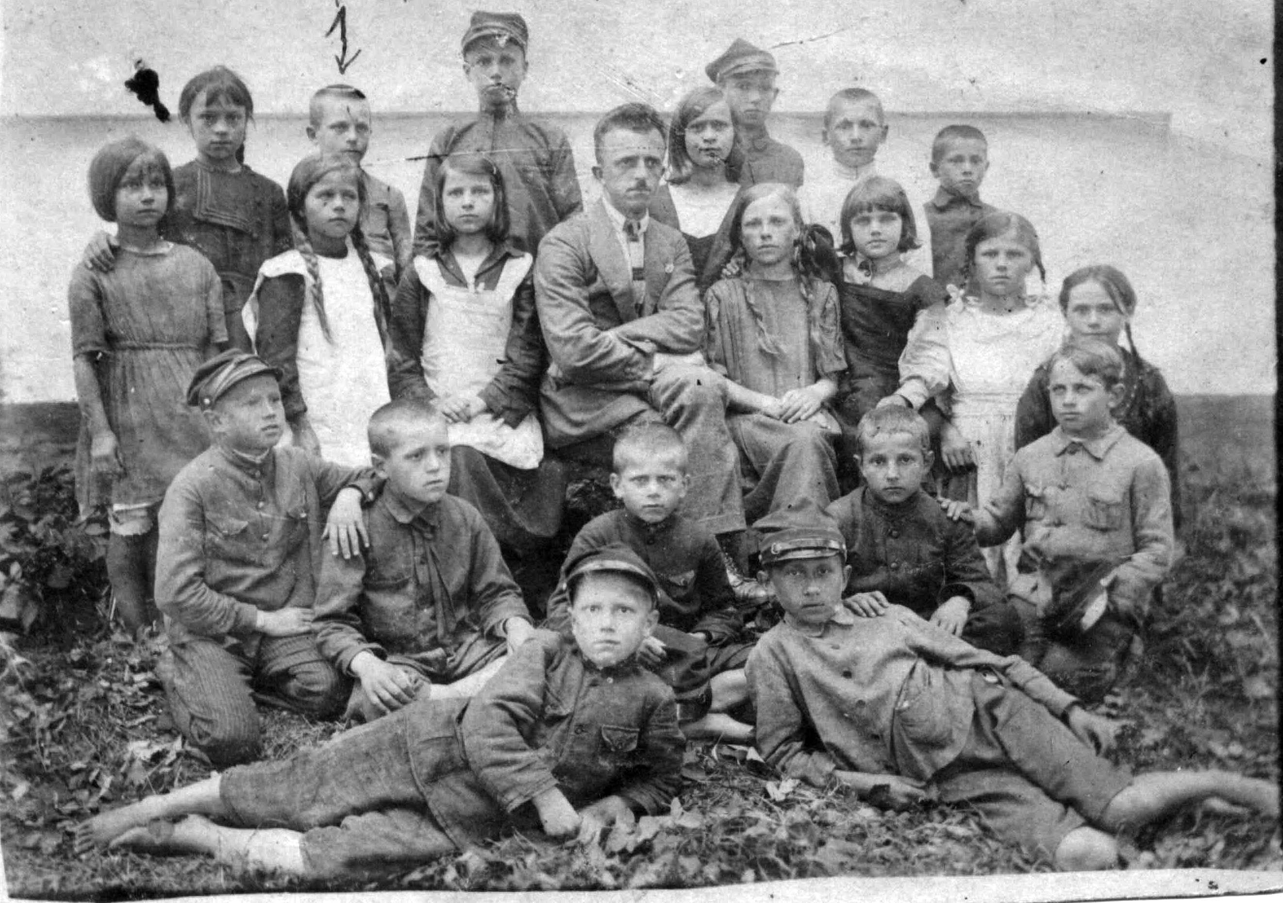 Uczniowie szkoły w Horodnianach. 1924-06-18. Nauczyciel Zygmunt Kalinowicz